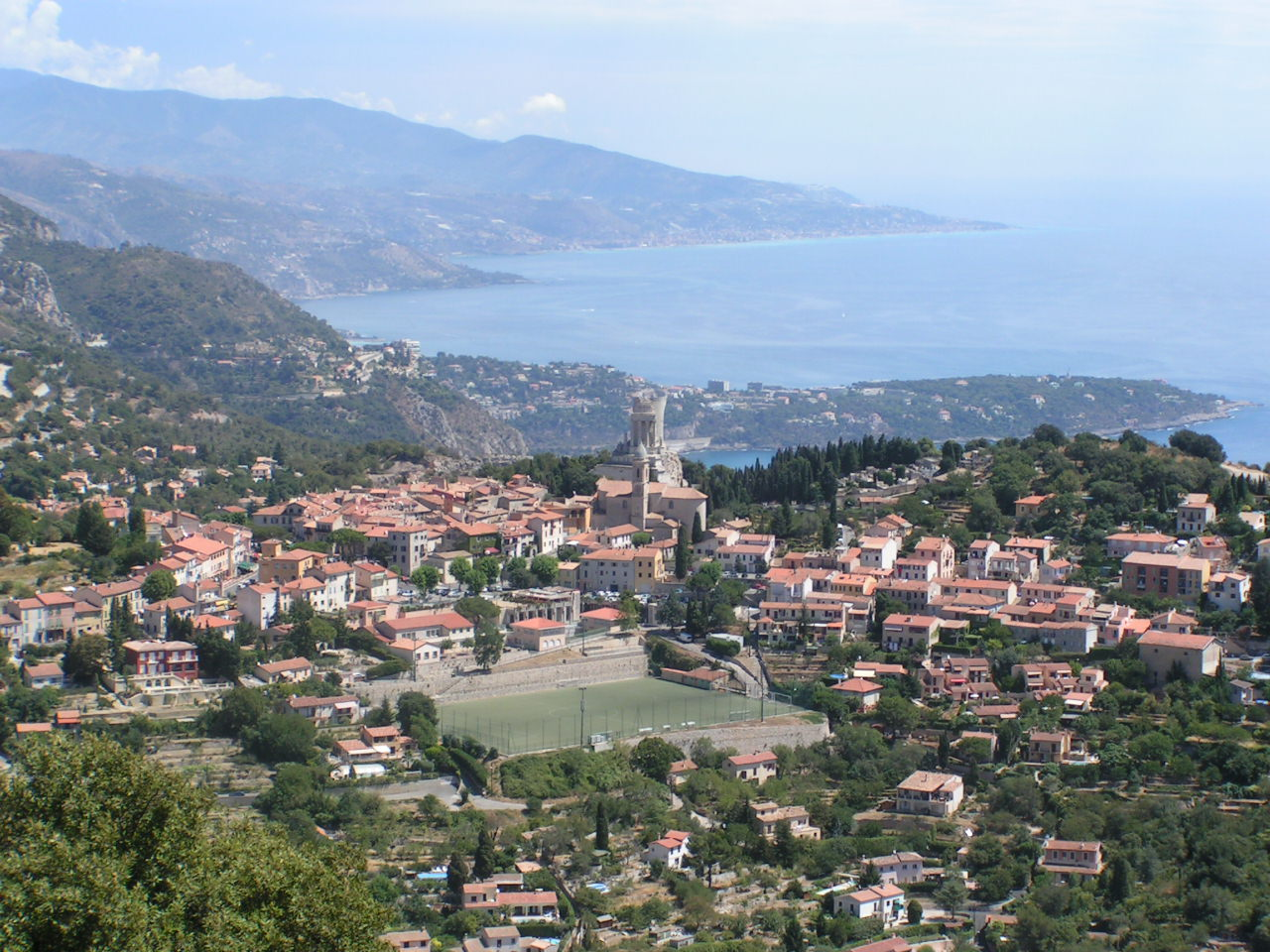 Dorp La Turbie